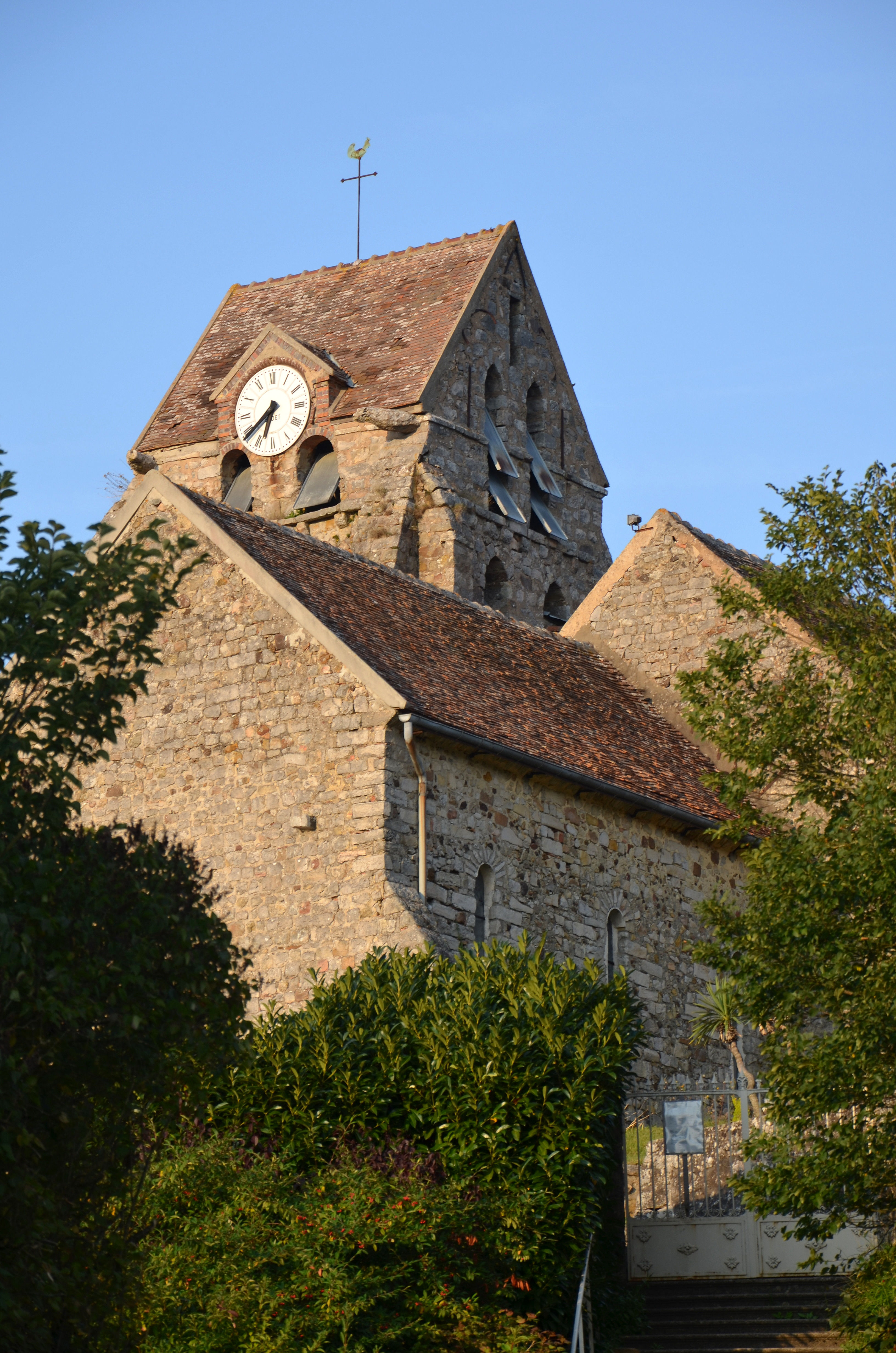 Église de Montmachoux (Seine-et-Marne), France